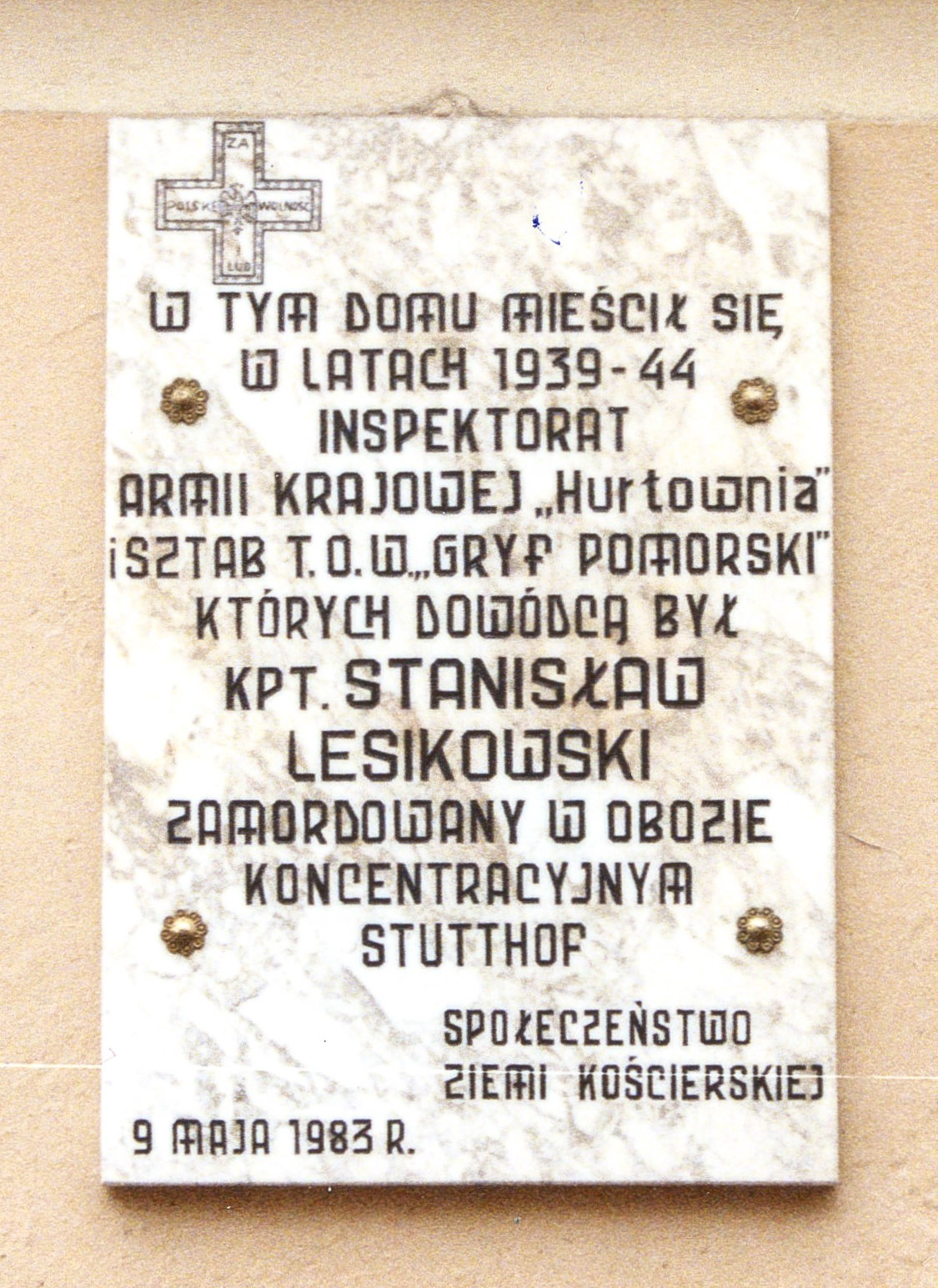 Tablica pamiątkowa, Kościerzyna.